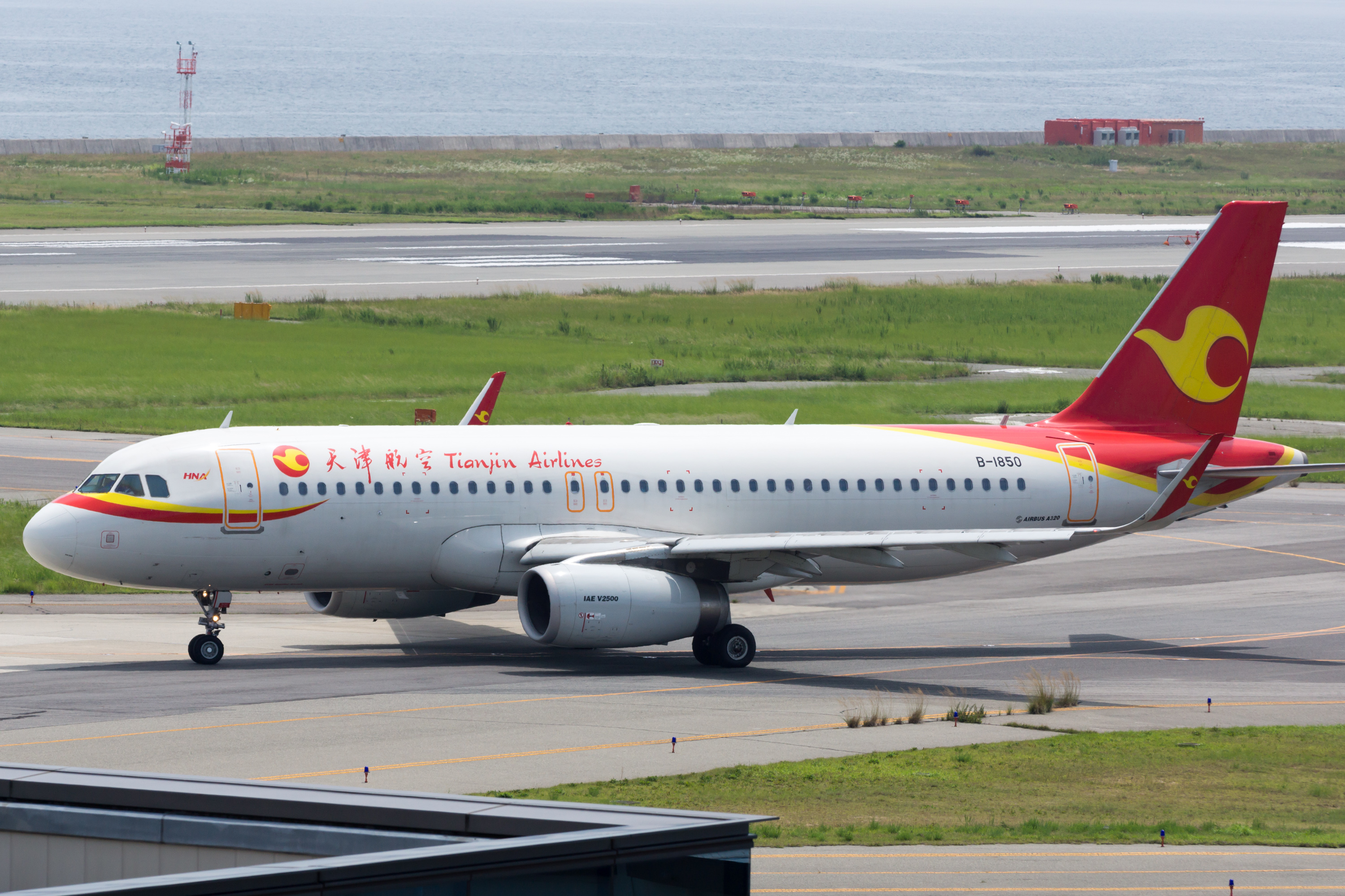 Tianjin Airlines / 天津航空 Airbus A320-232 B-1850 GS6416, Departed to Tianjin Osaka Kansai Int'l Airport